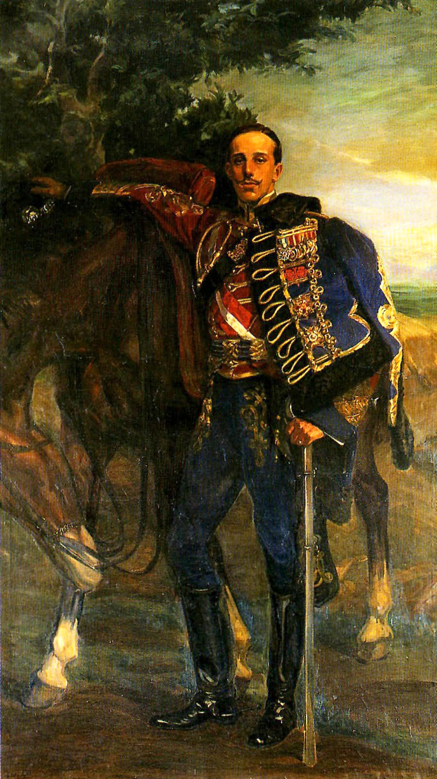 Retrato del rey Alfonso XIII de España (1886-1941), con el uniforme del regimiento de Húsares de Pavía.